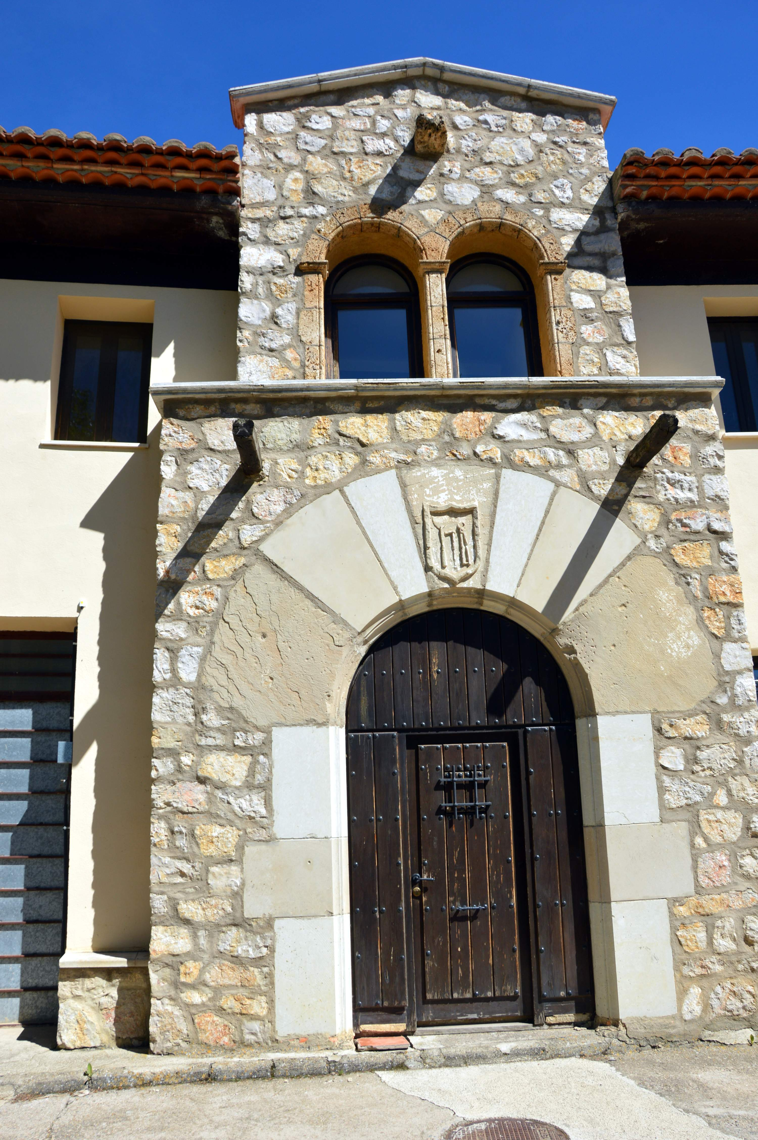 Vista parcial de la Casa Consistorial de Jabaloyas (Teruel), con detalles arquitectónicos del anterior Ayuntamiento (2017).